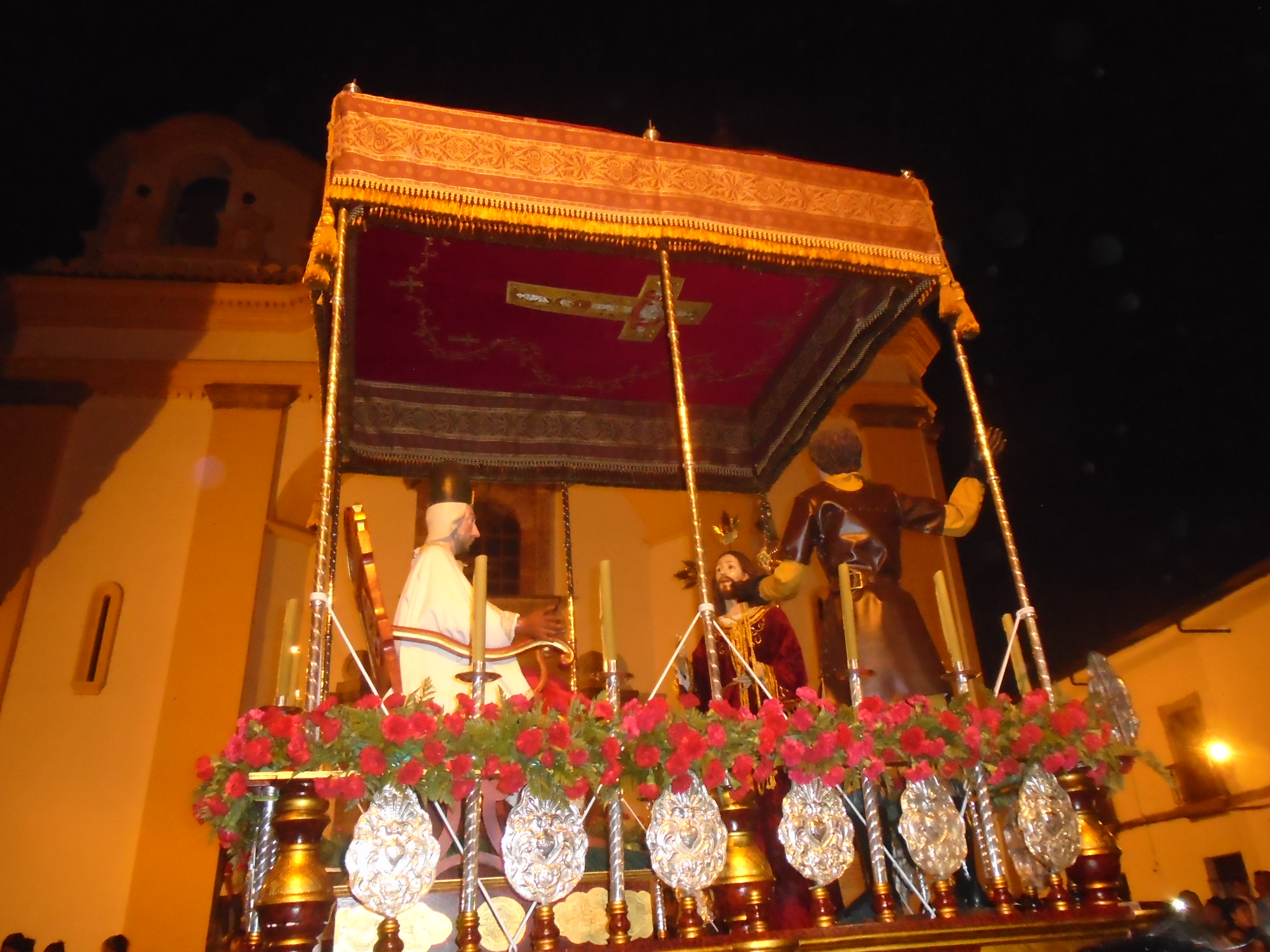 Semana Santa en Popayán el 24 de marzo de 2016. Esta fotografía fue tomada en el municipio colombiano con código 19001.